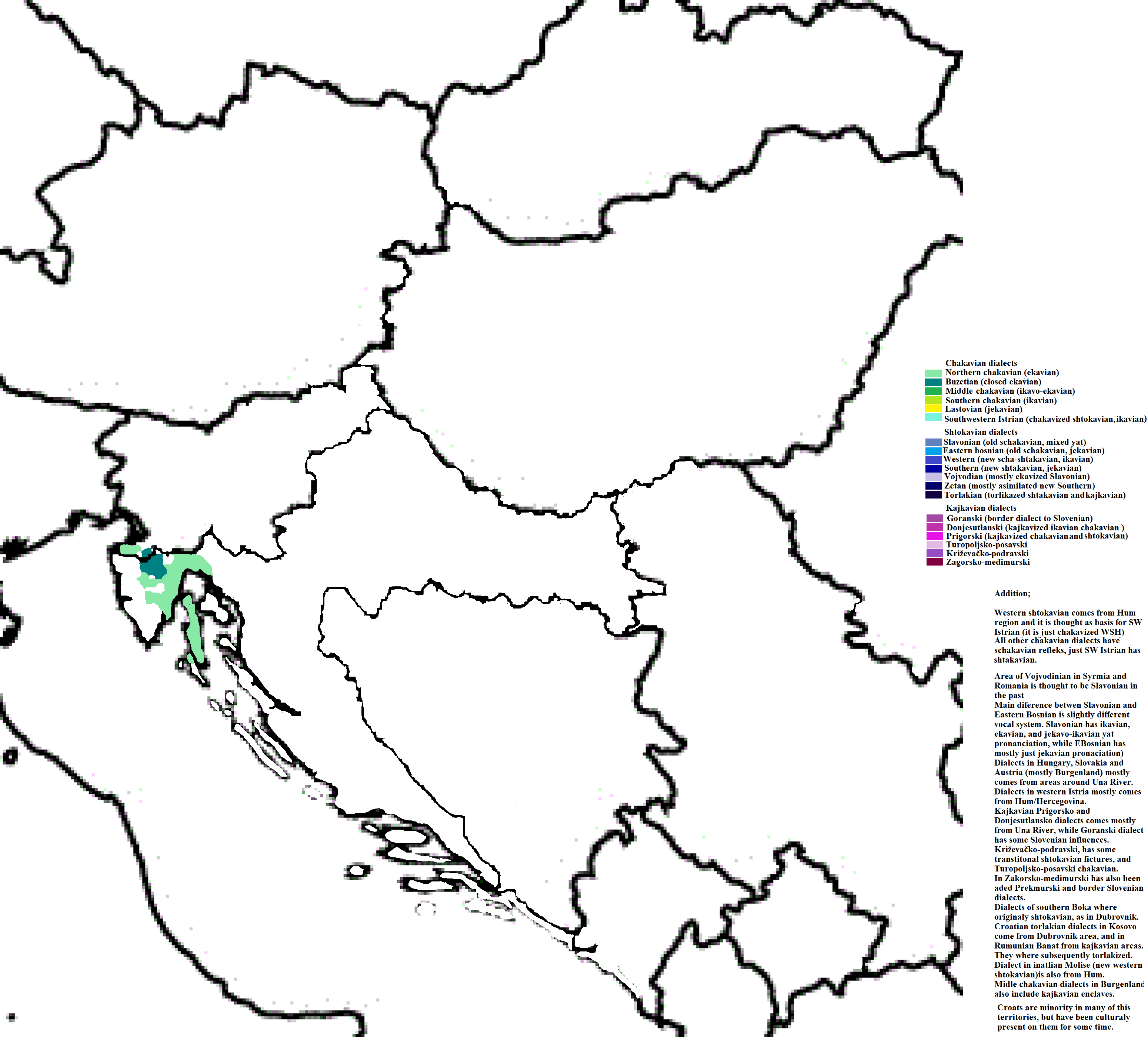 Sjevernočakavski i povezani dijalekti (buzetski)